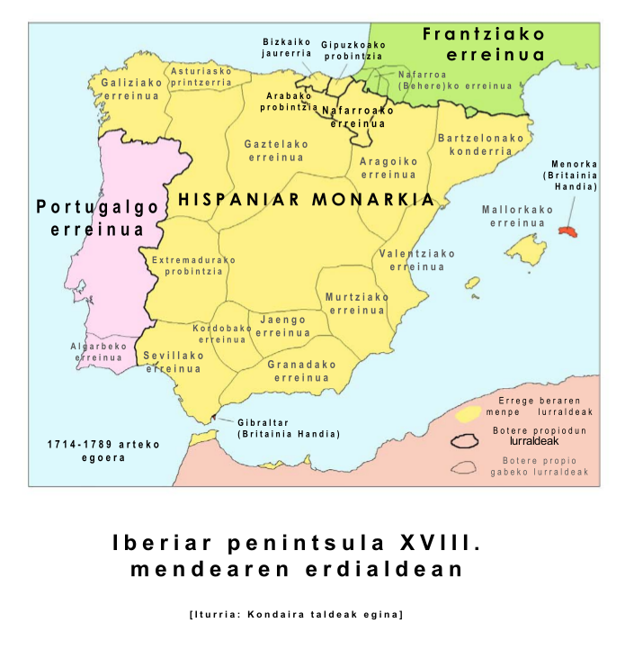 Iberiar penintsula XVIII. mendearen erdialdean, UEUren kondaira.eus webgunetik hartua.